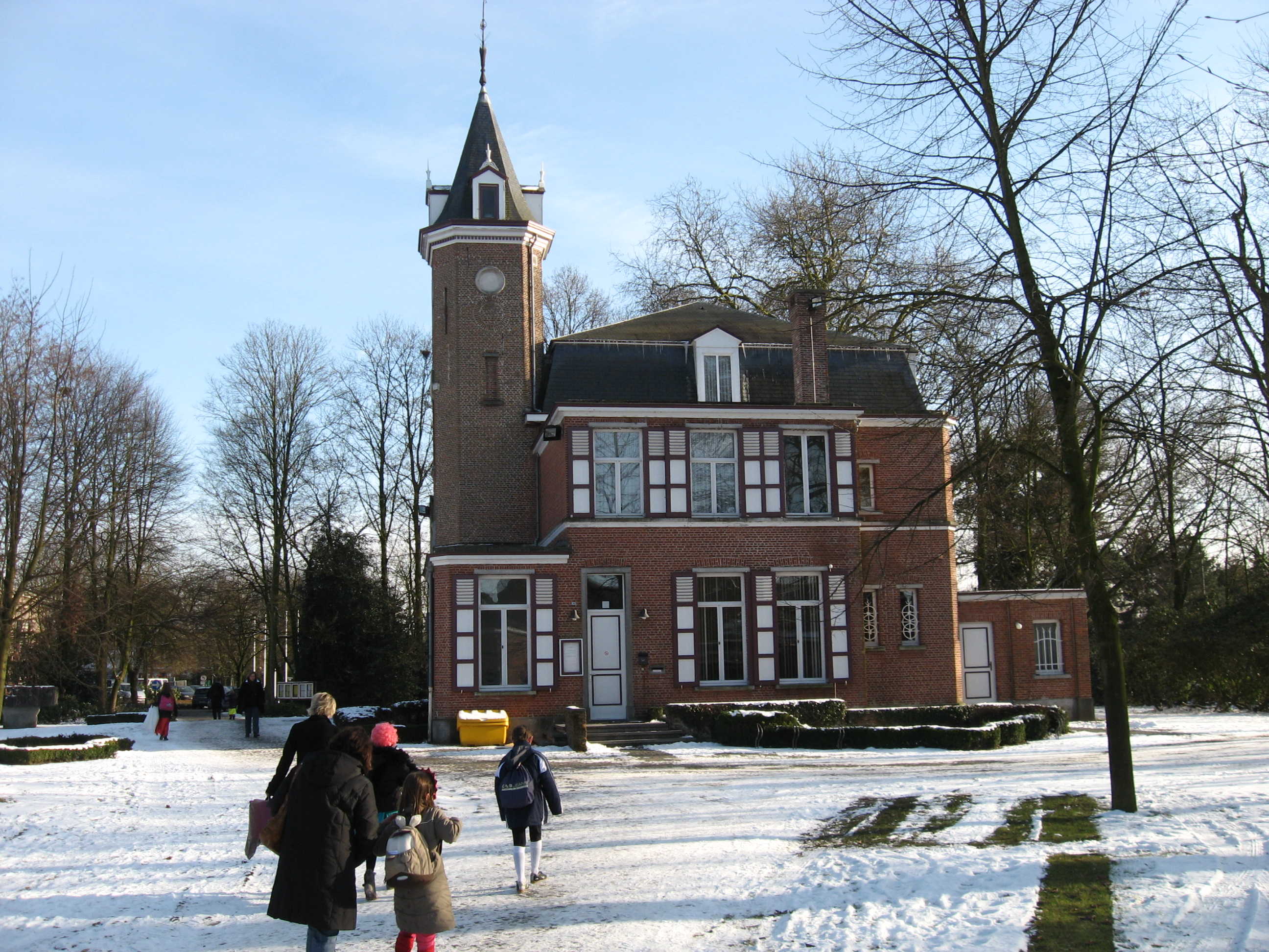 Kasteel Neut en park in Brecht nu gebruikt als gemeentehuis.